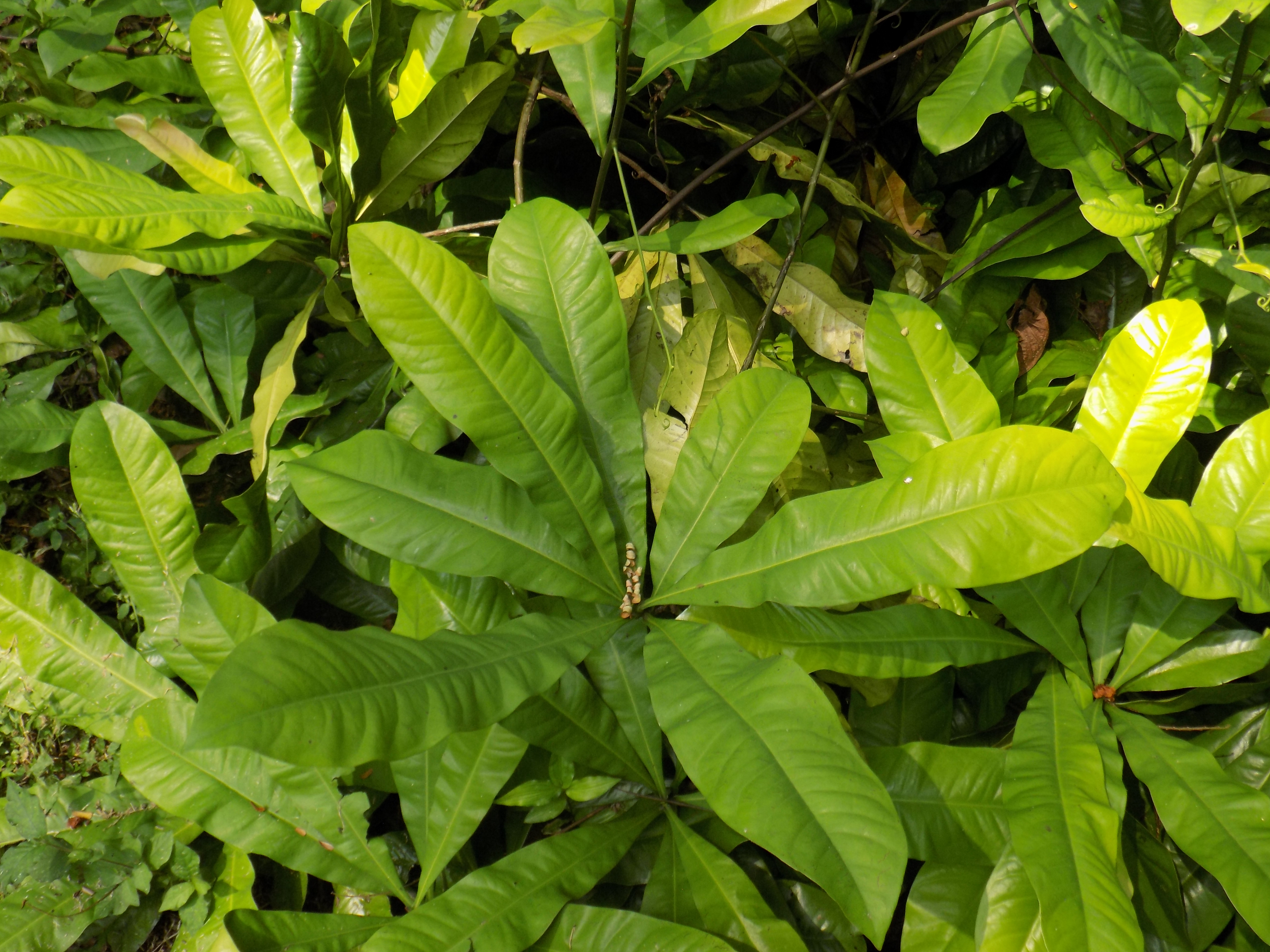 Ancistrocladus korupensis D.W.Thomas & Gereau est une liane tropicale de la famille des Ancistrocladaceae, décrite pour la première fois dans la province du Sud-Ouest au Cameroun. Jardin botanique de Limbé, Région du Sud-Ouest, Cameroun